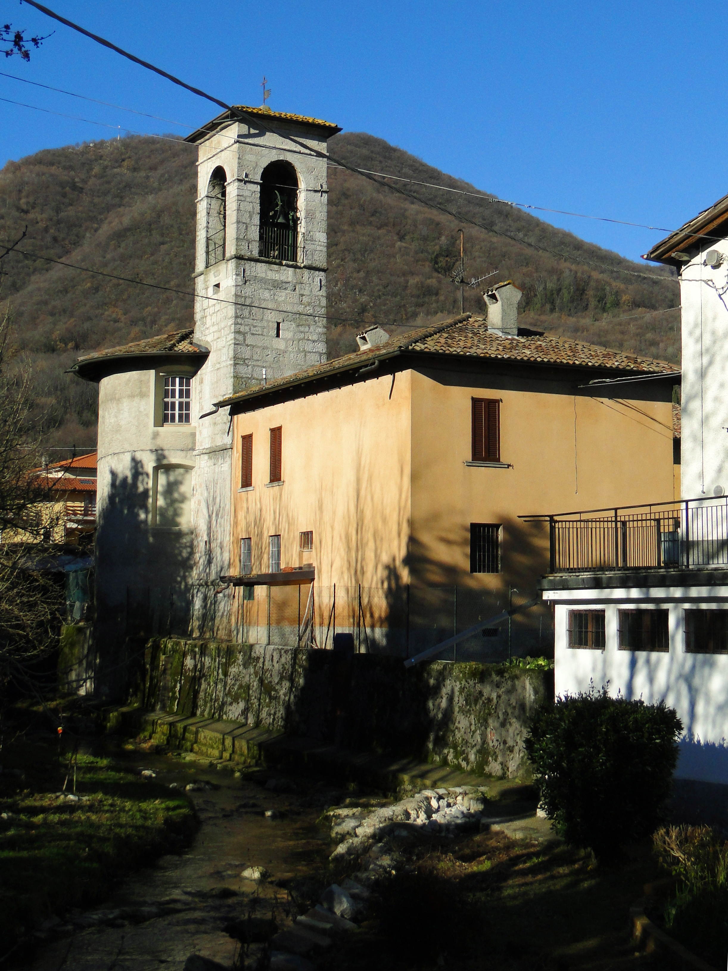 Busa, fraz. di Alzano Lombardo (BG), Italy. Chiesa Ss. Trinità